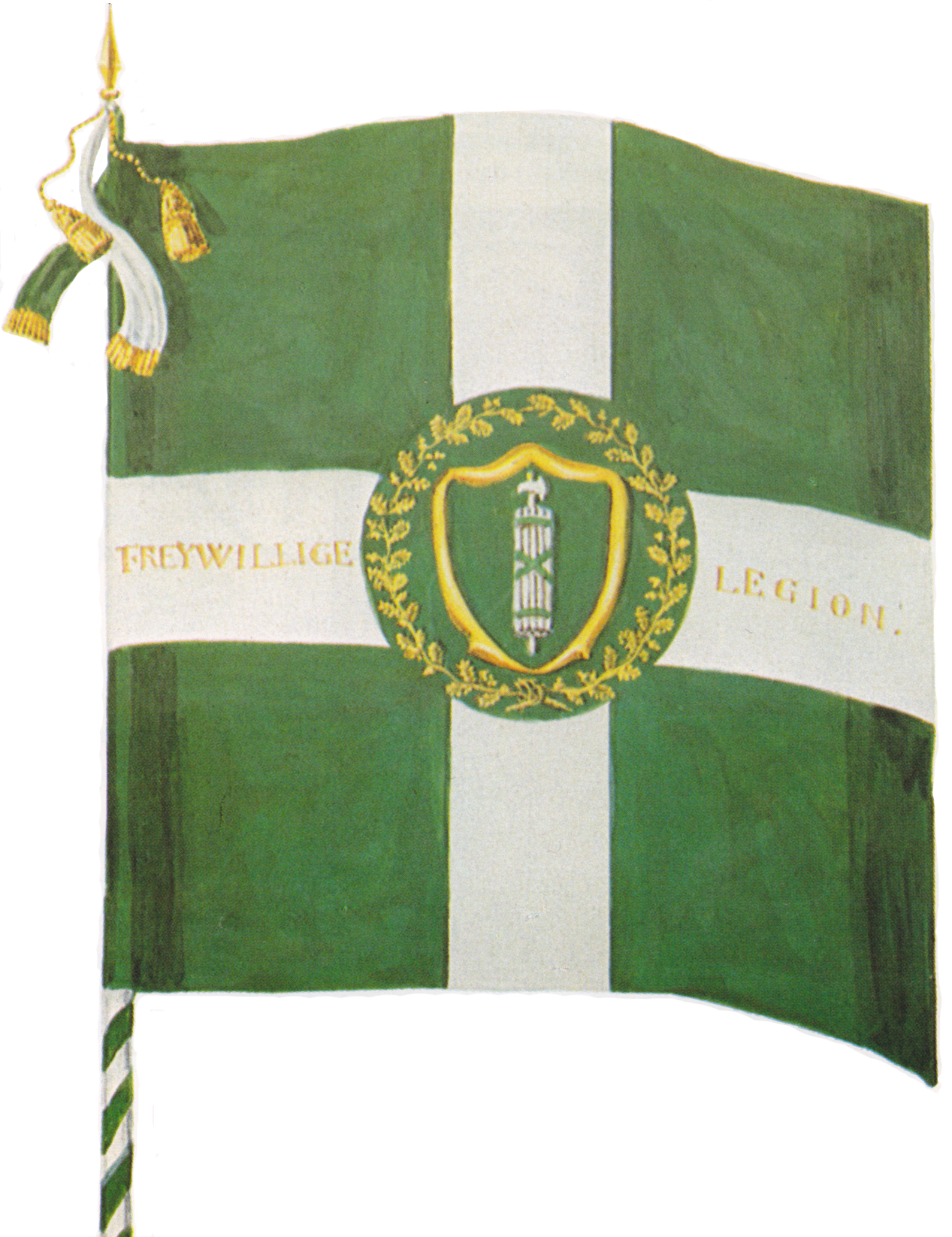 Fahne der Freiwilligen Legion des Kantons St. Gallen 1804. Vorderseite. Aquarell von D. W. Hartmann.